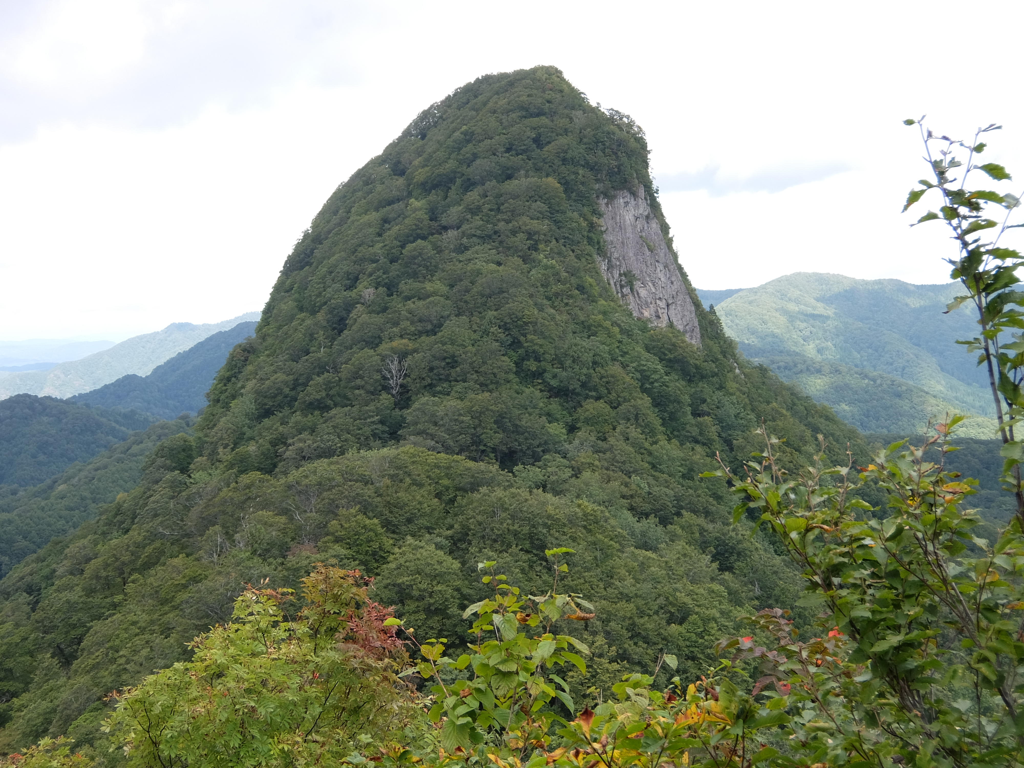 男甑山の胸突八丁から見た女甑山